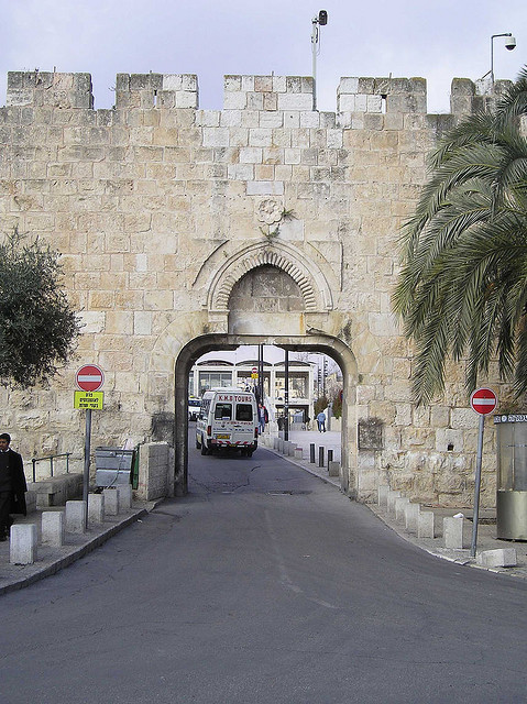 Jerusalem, Dung Gate, 2006